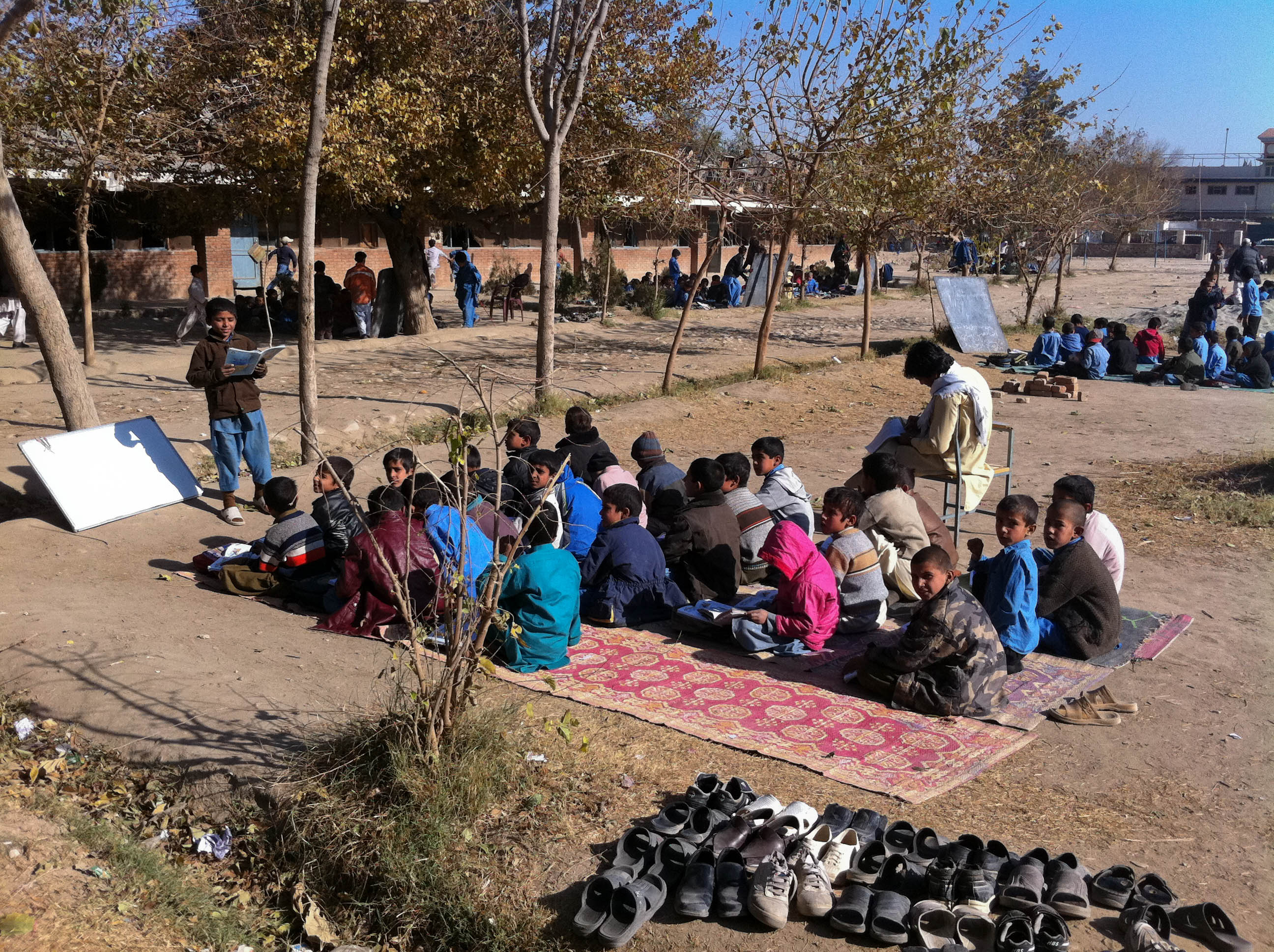 Carpet Classroom